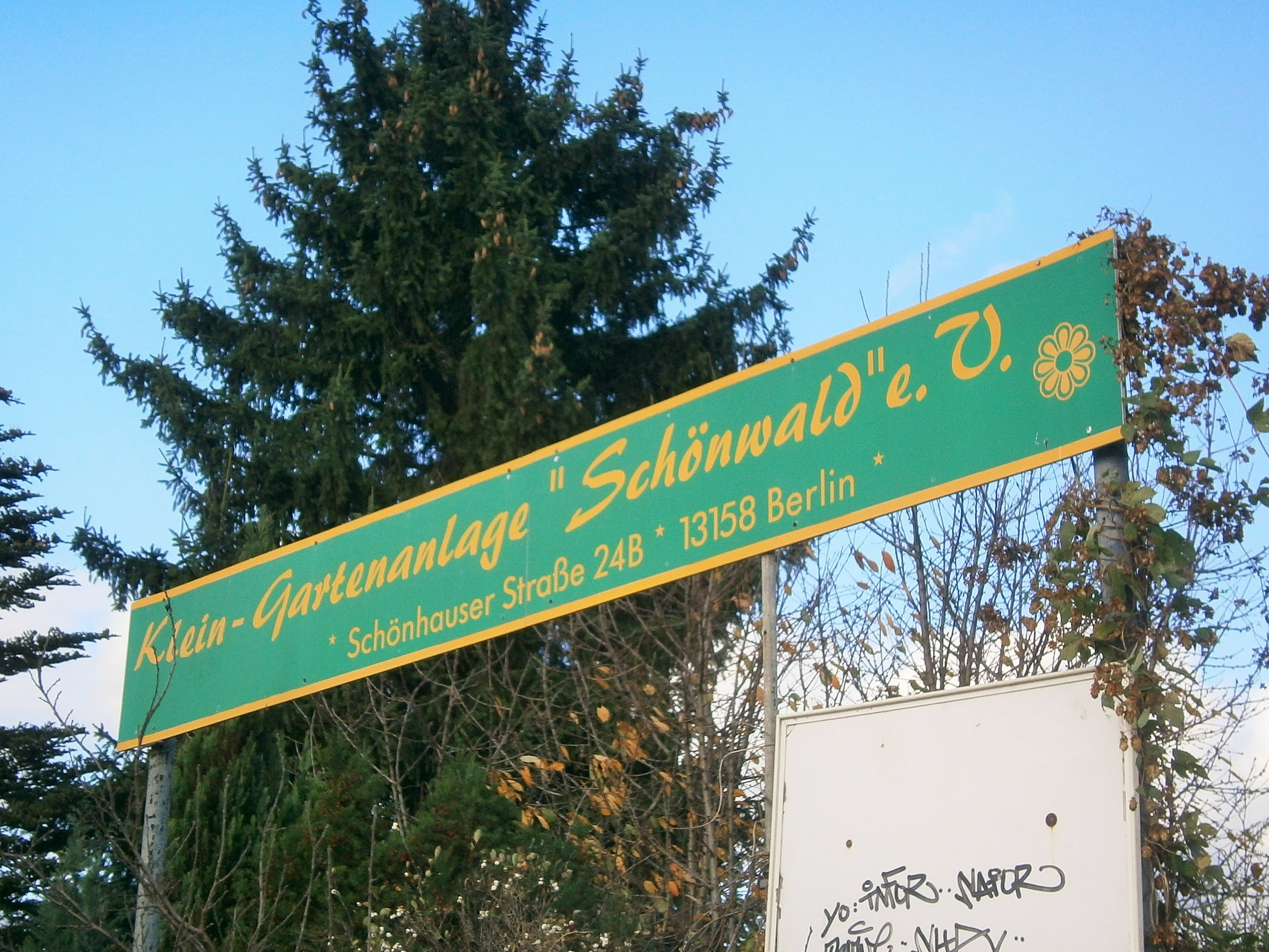 Schönhauser Straße ist eine Straße in Berlin-Rosenthal. Hier in Höhe der KGA Schönwald.